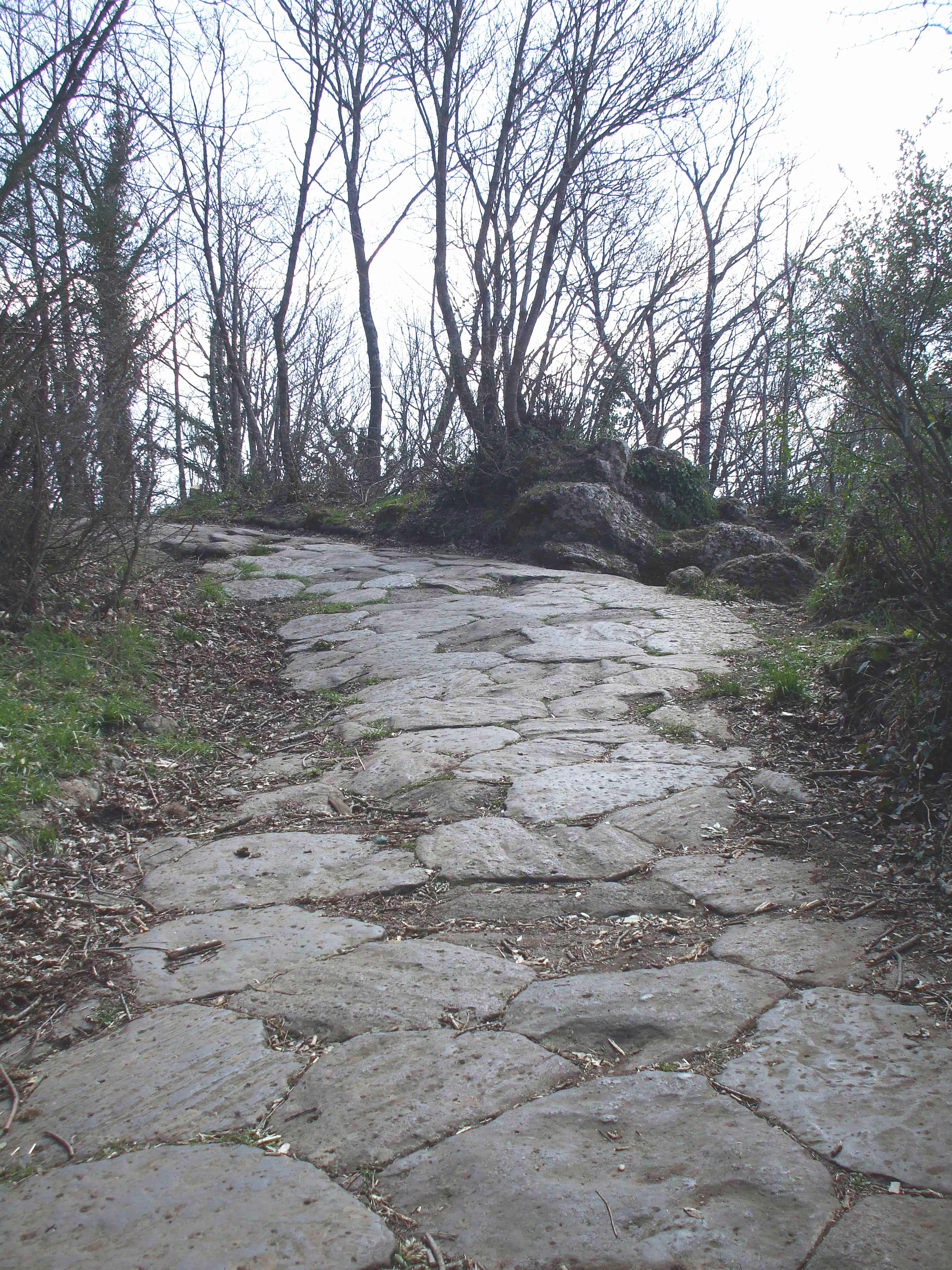 Colli Albani - Monte Cavo - la Via Sacra